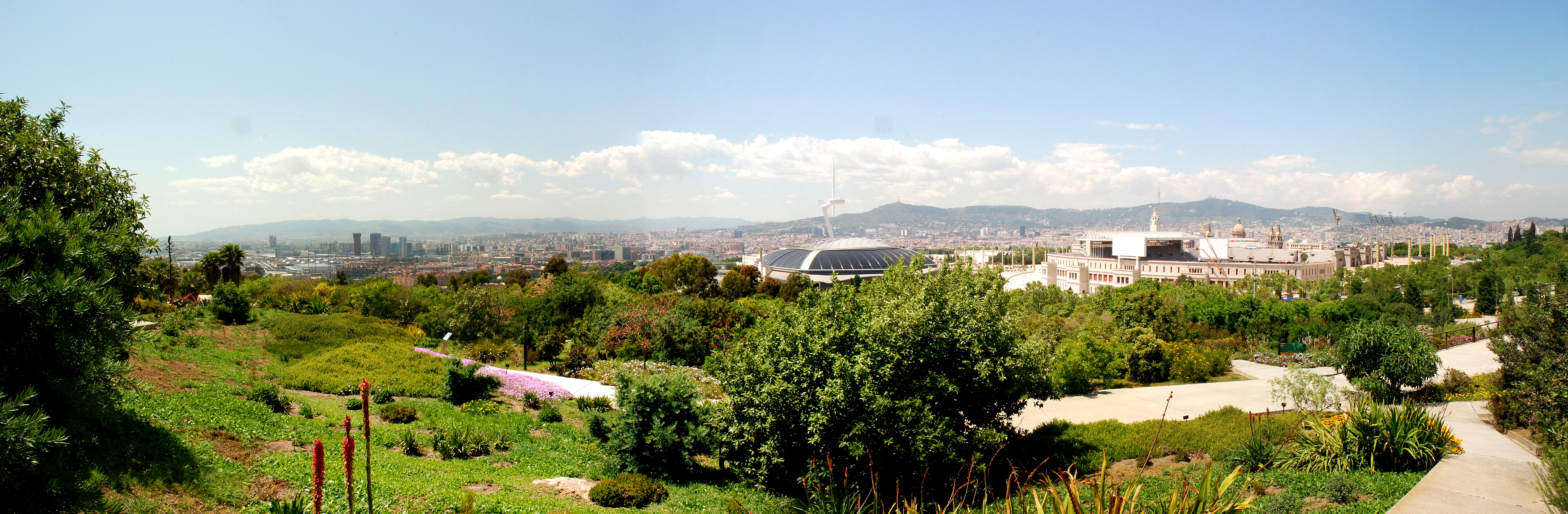 De Botanische Tuin van Barcelona (Spanje)